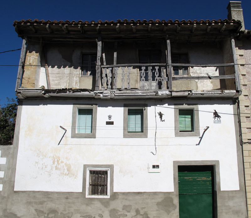 Casa con restos de balcón tradicional en el pueblo de La Nave (Miranda de Ebro, España)